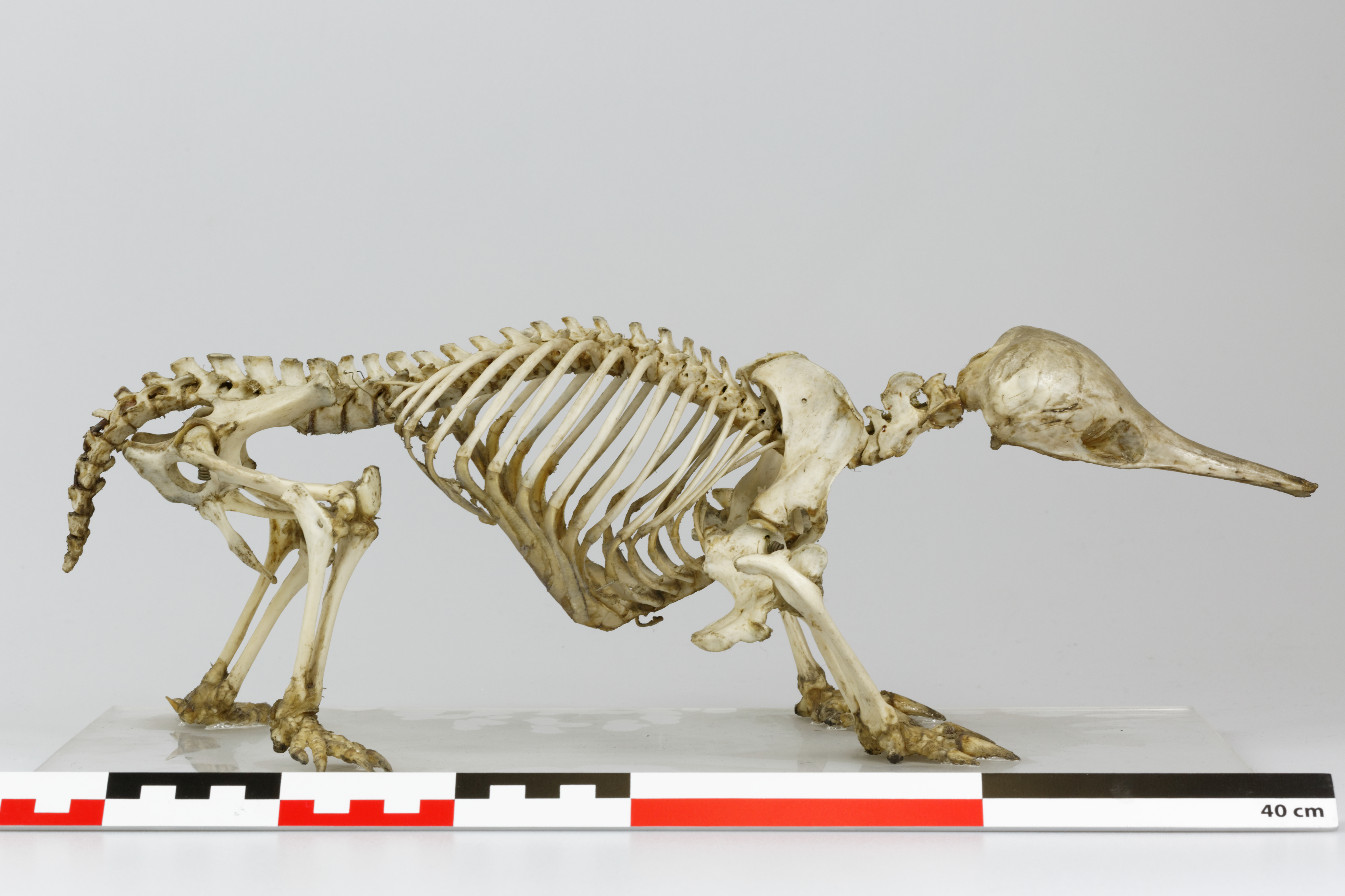 Un échidné - Tachyglossus aculeatus - de la collection de l'Université Pierre-et-Marie-Curie à Paris.